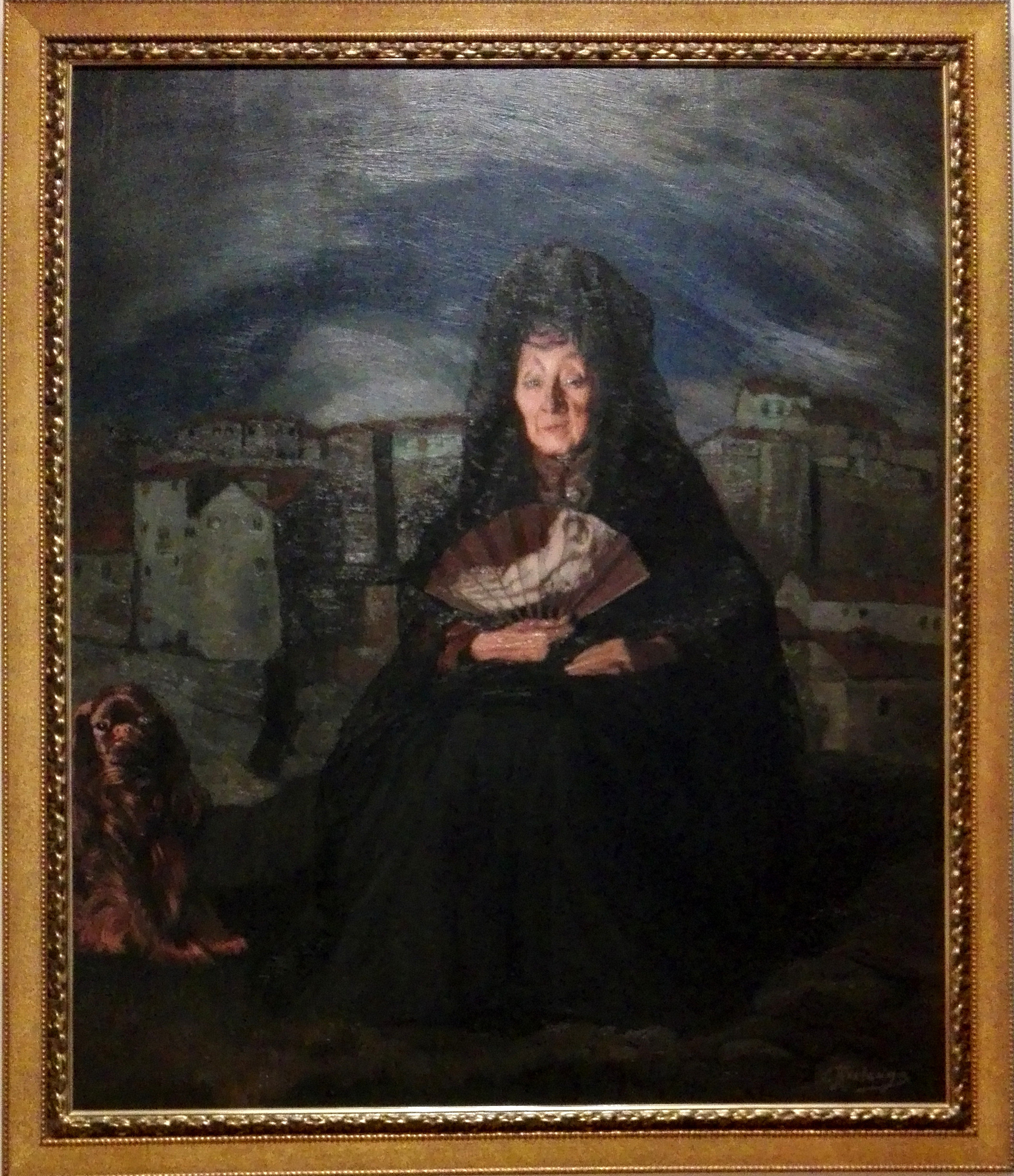 Gemälde von Ignacio Zuloaga im Museo de Bellas Artes de Bilbao